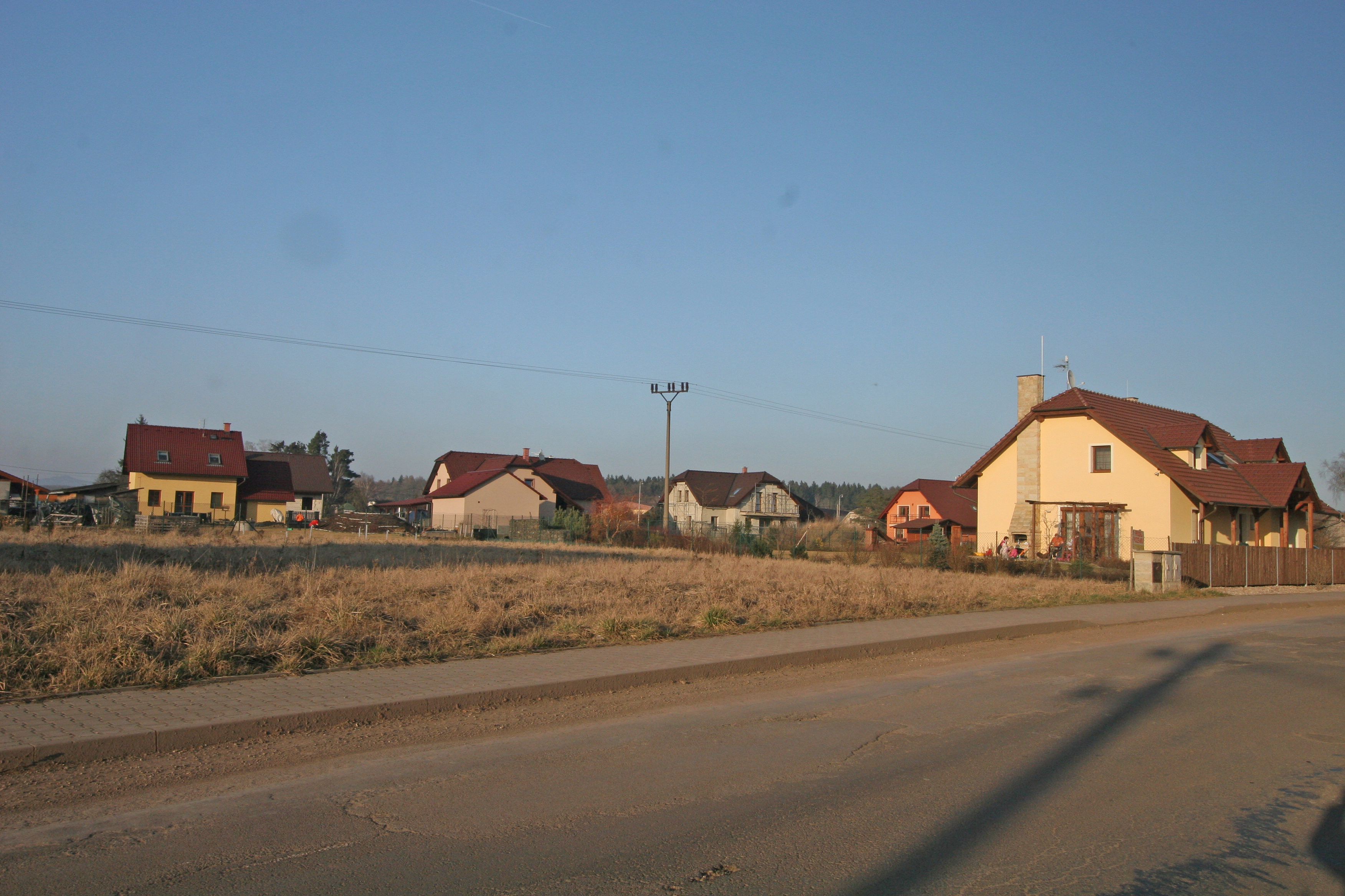 Butoves novostavby